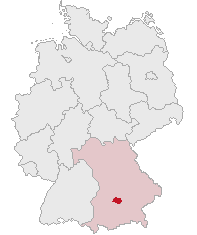 Landkreis Dachau, Bavaria, Germany